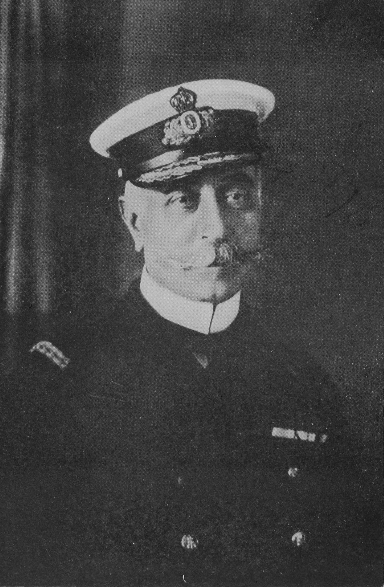 El almirante griego Coundouritis.